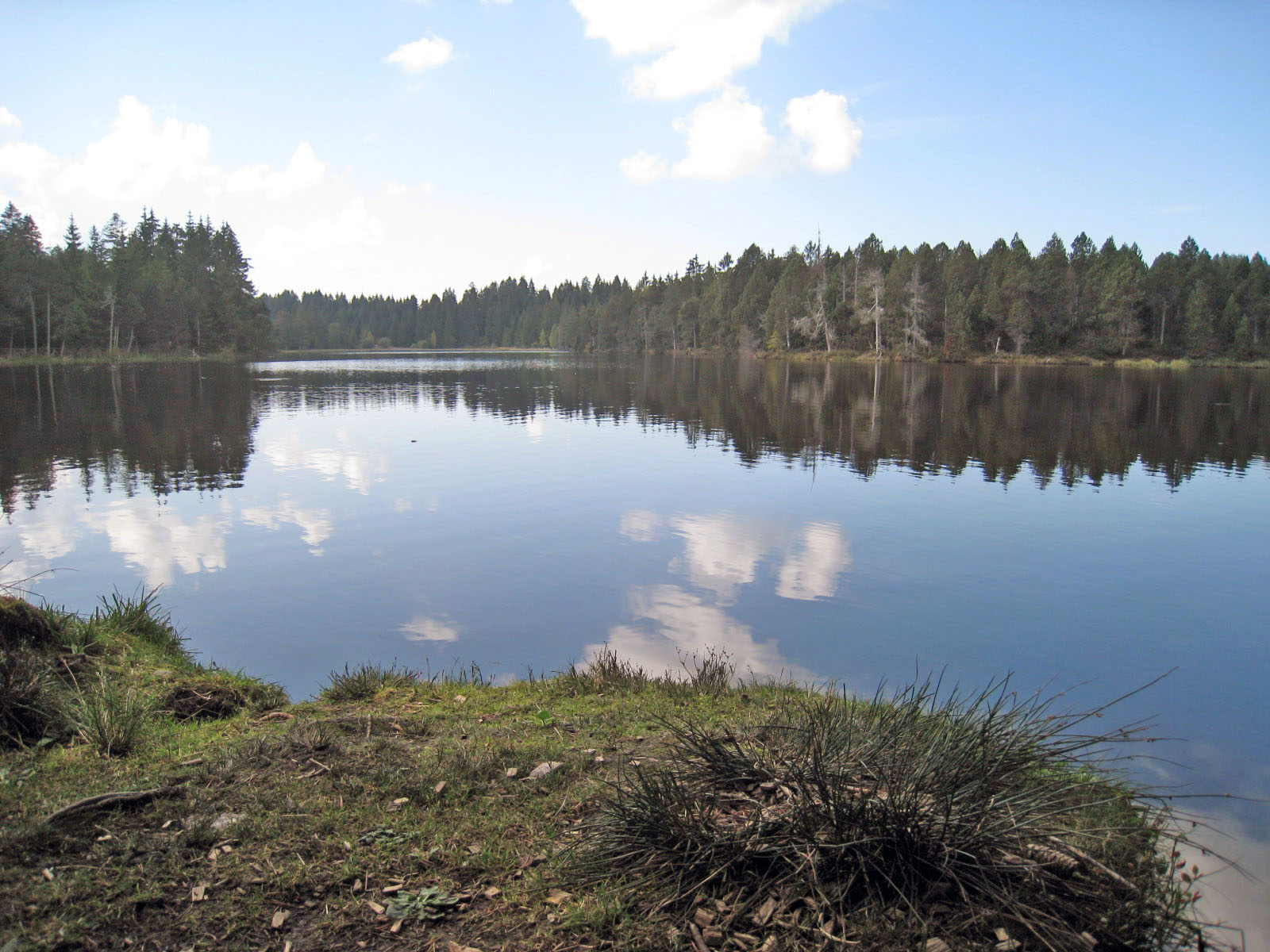 Etang de la Gruère, Kanton Jura, Schweiz